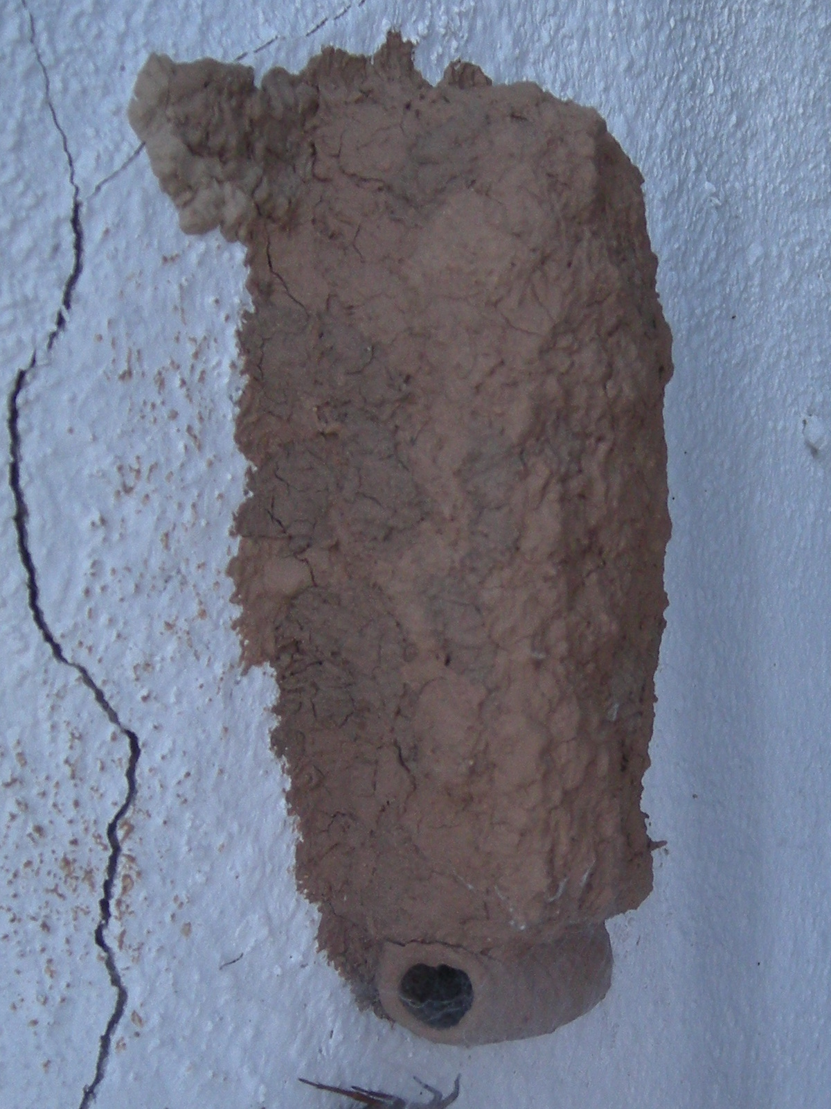 Niu de picapedrer o vespa de fang (Sceliphron spirifex). Dues setmanes més tard que Image:Sceliphron.nest2.jpg.